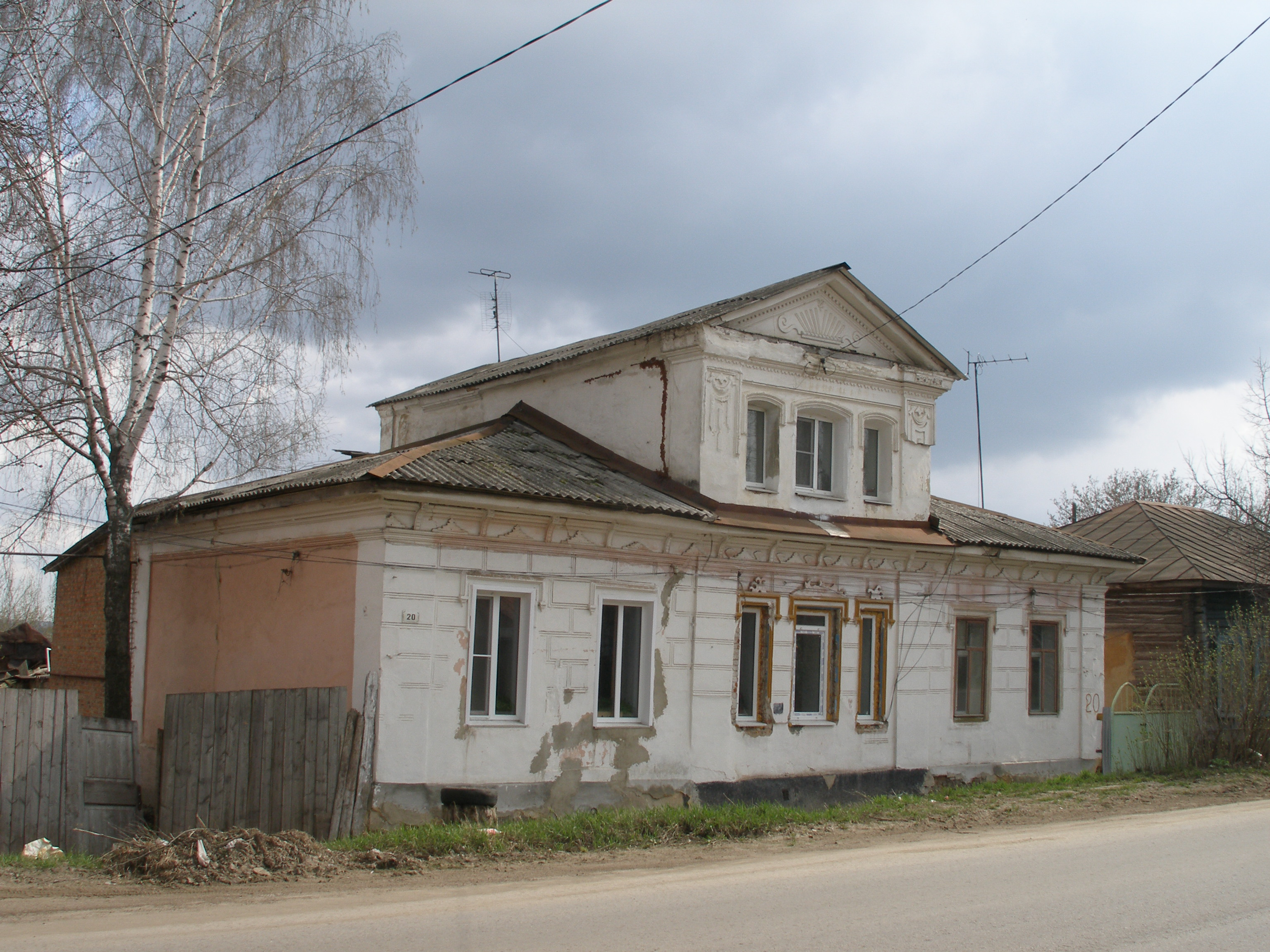 Тульская обл., г. Ефремов ул. К. Маркса д. 20